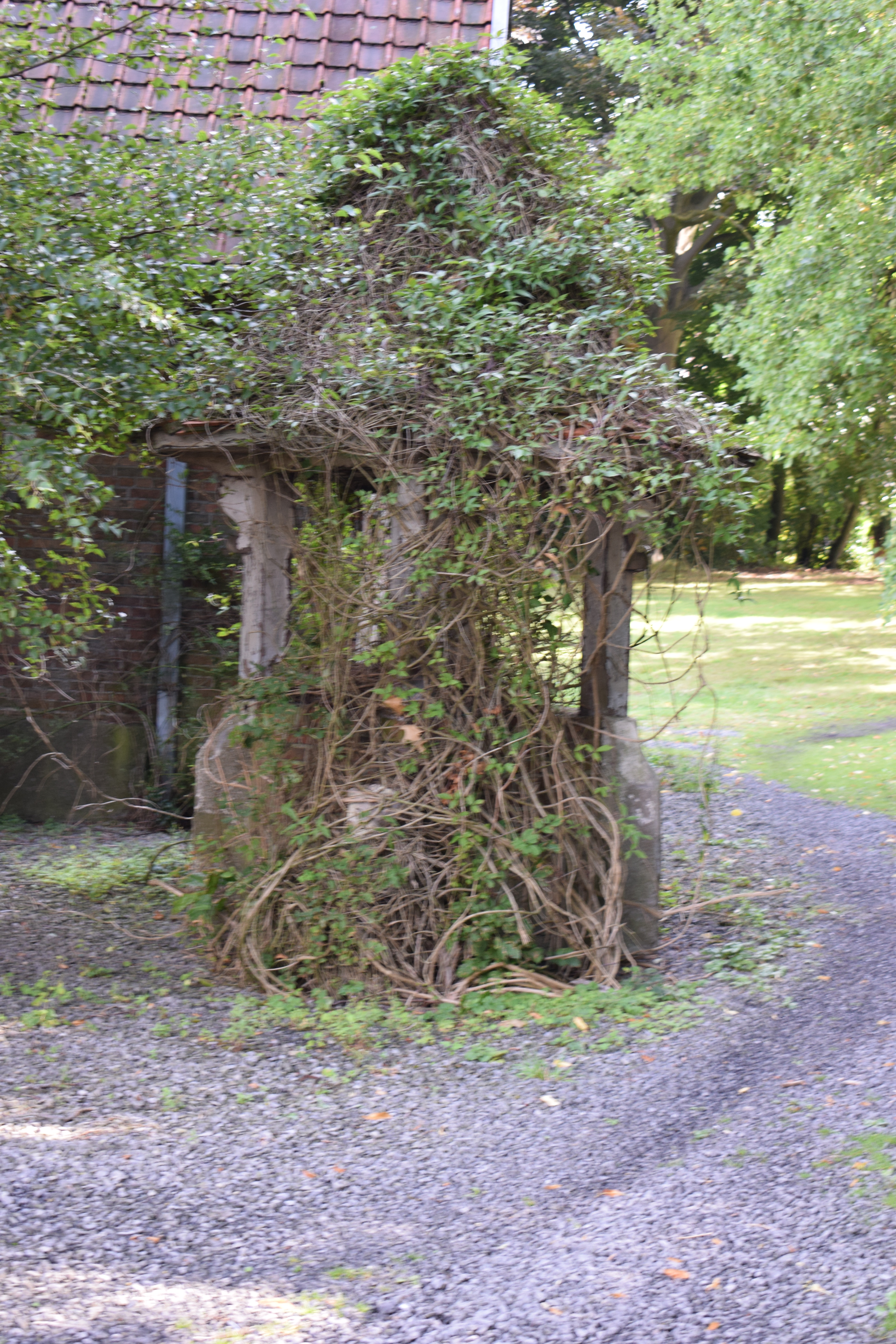 Huidige staat van de waterput.